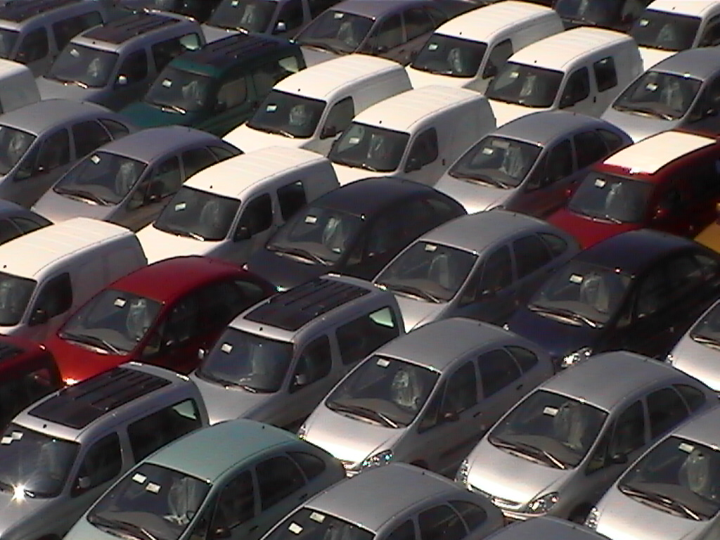 Coches Citroen en Zona Franca de Vigo.